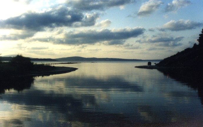 Ropotamo river in southern Bulgaria. автор Георги Петров